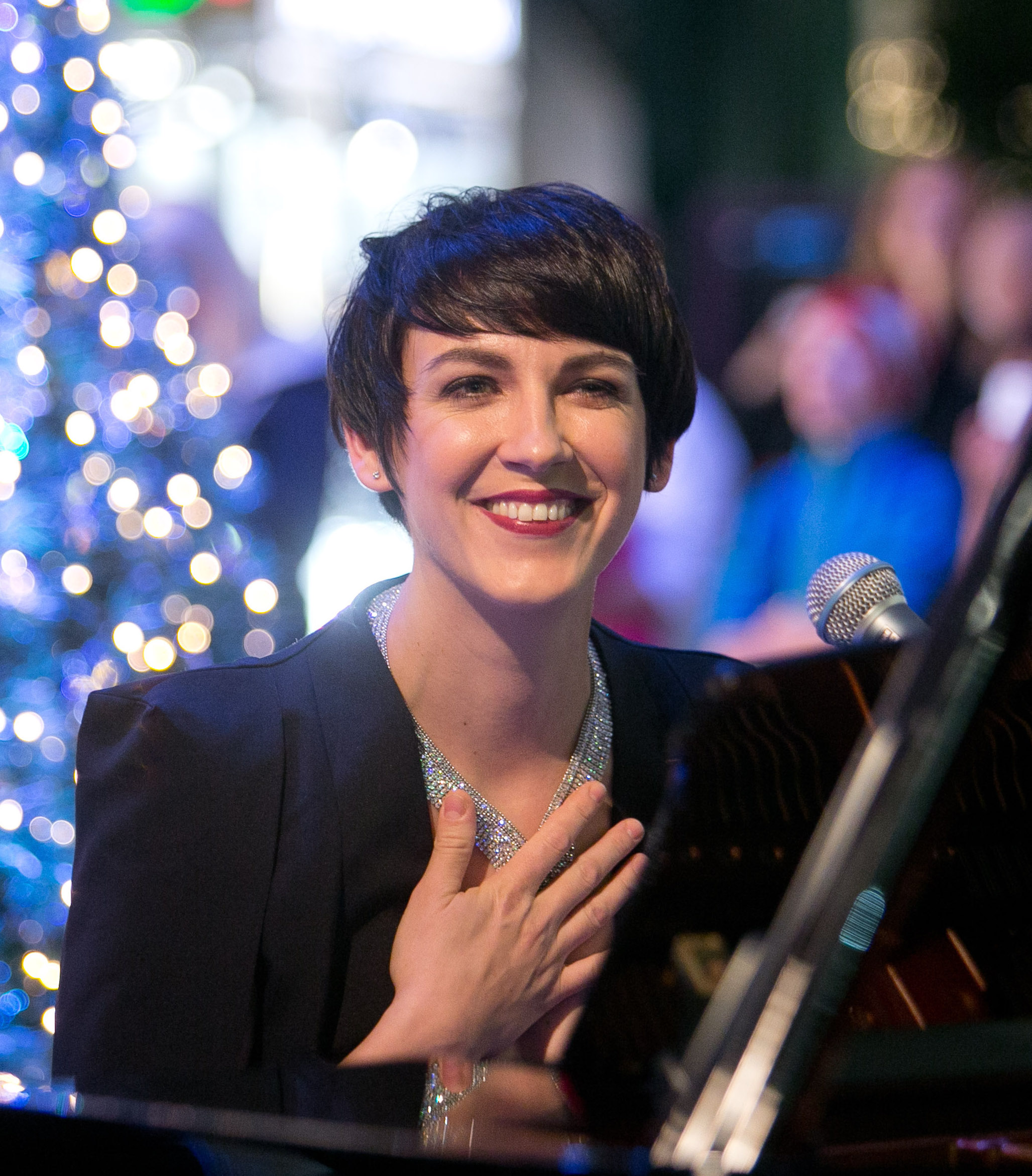 pic by wildbild, copyright free